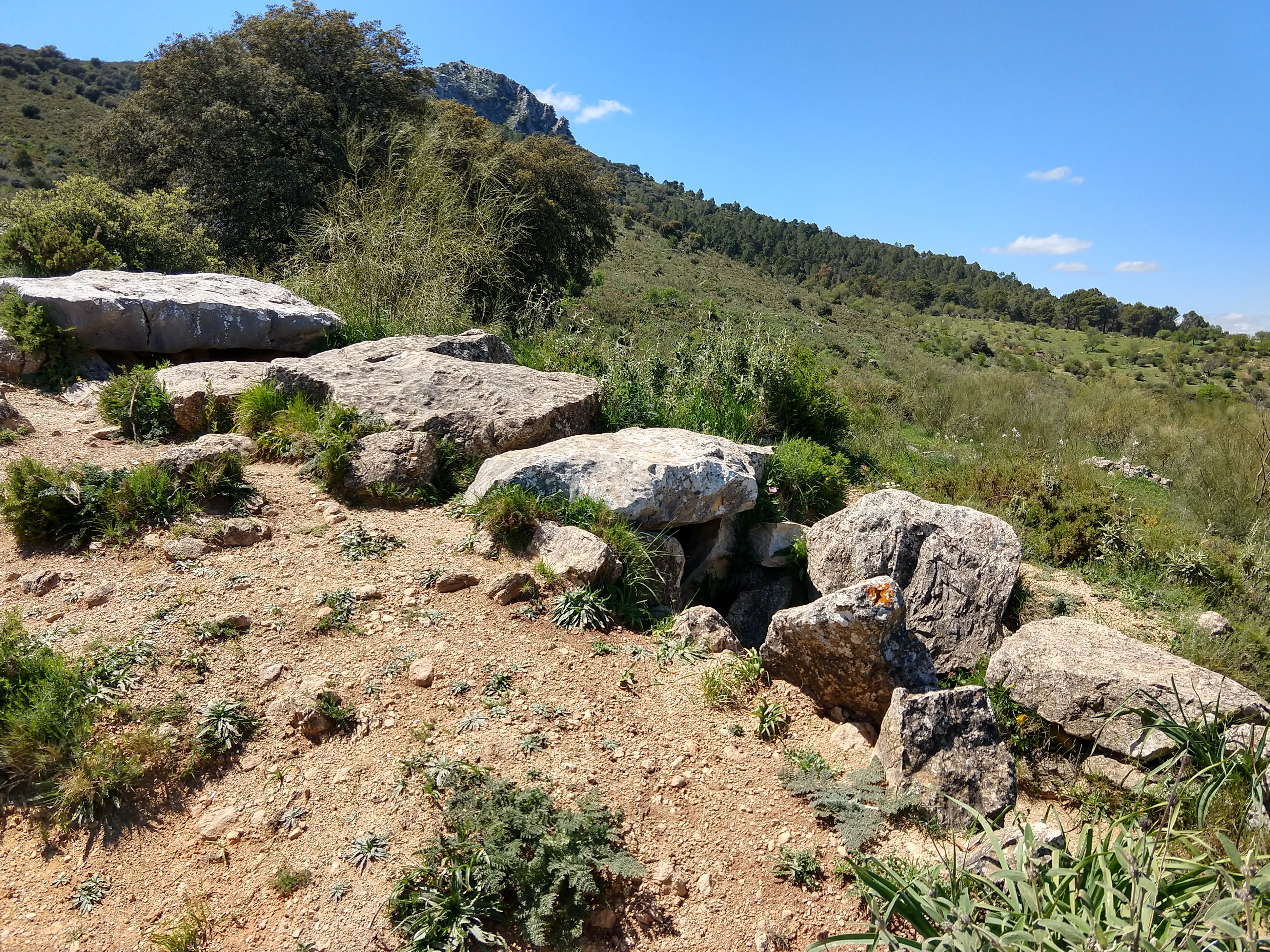 Vista longitudinal del Dolmen del Gigante, en Montecorto, en abril de 2018.